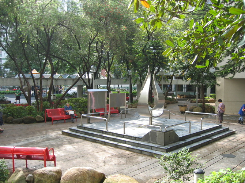 HK Sun Chui Estate Garden 新翠邨內園